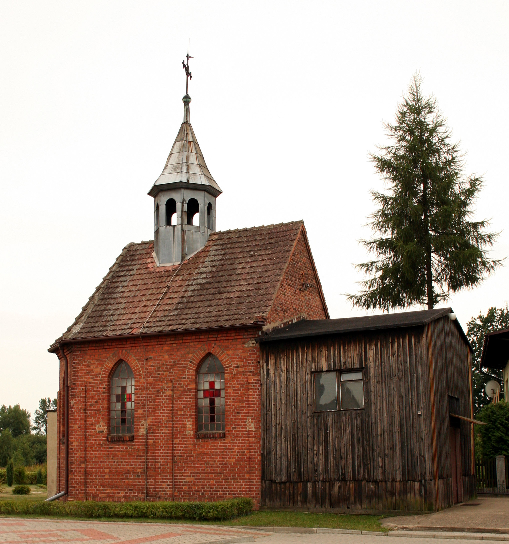 kaplica św. Anny w Hadrze, powiat lubliniecki